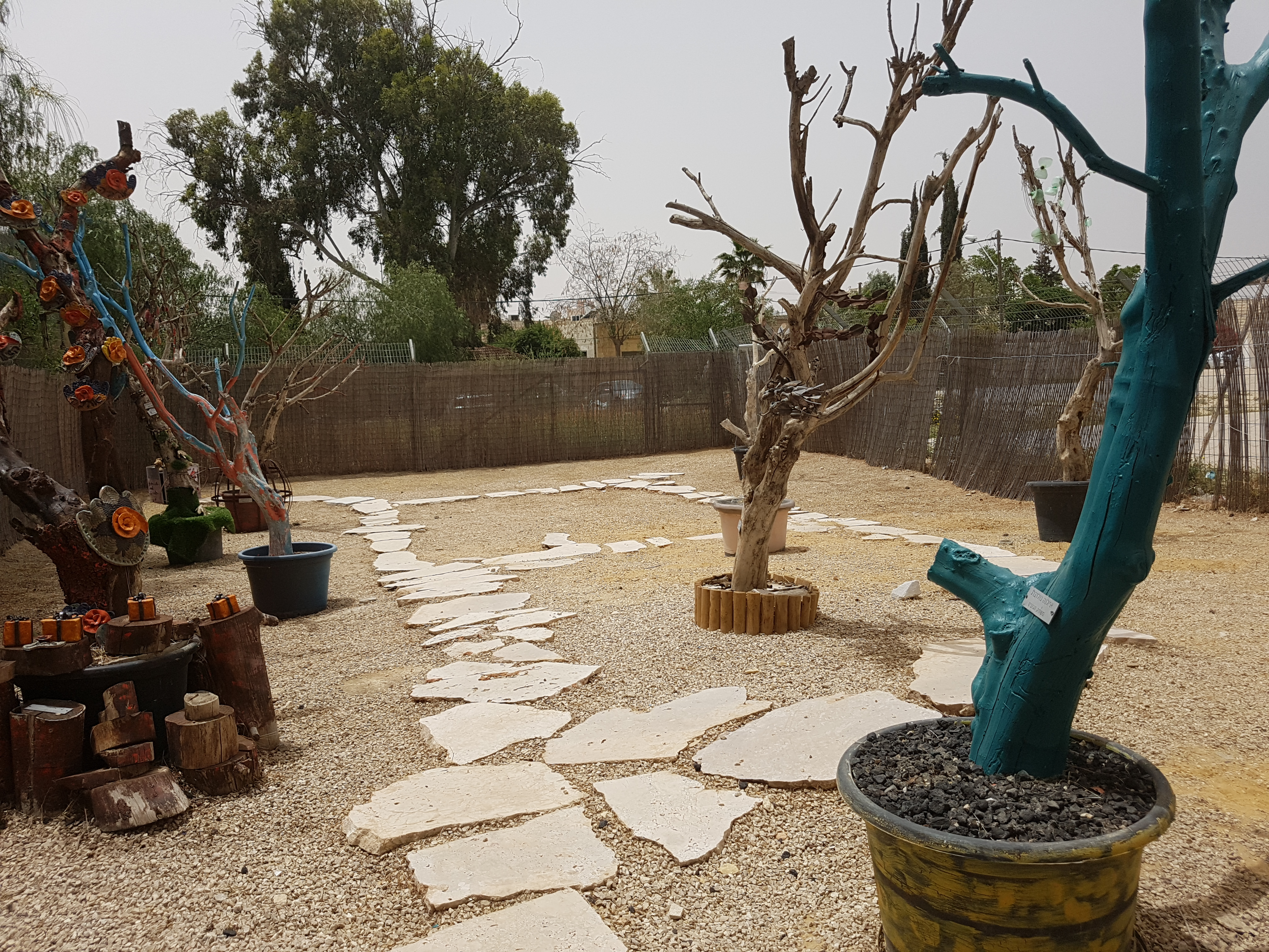 Beersheba